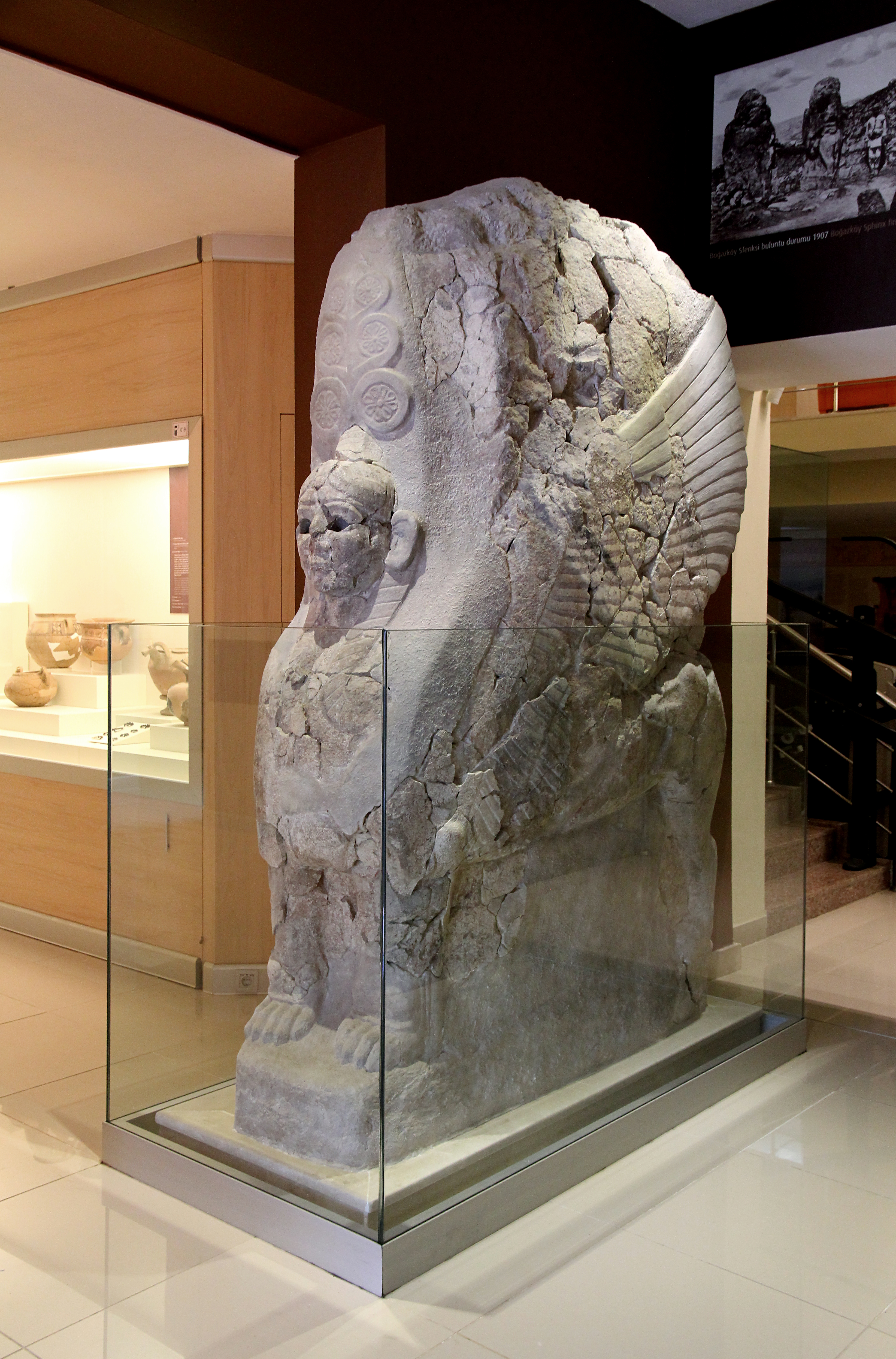 Ḫattuša, Hauptstadt der Hethiter, Museum Boğazkale, Zentraltürkei, restaurierte östliche Sphinx von der Nordseite des Sphinxtores